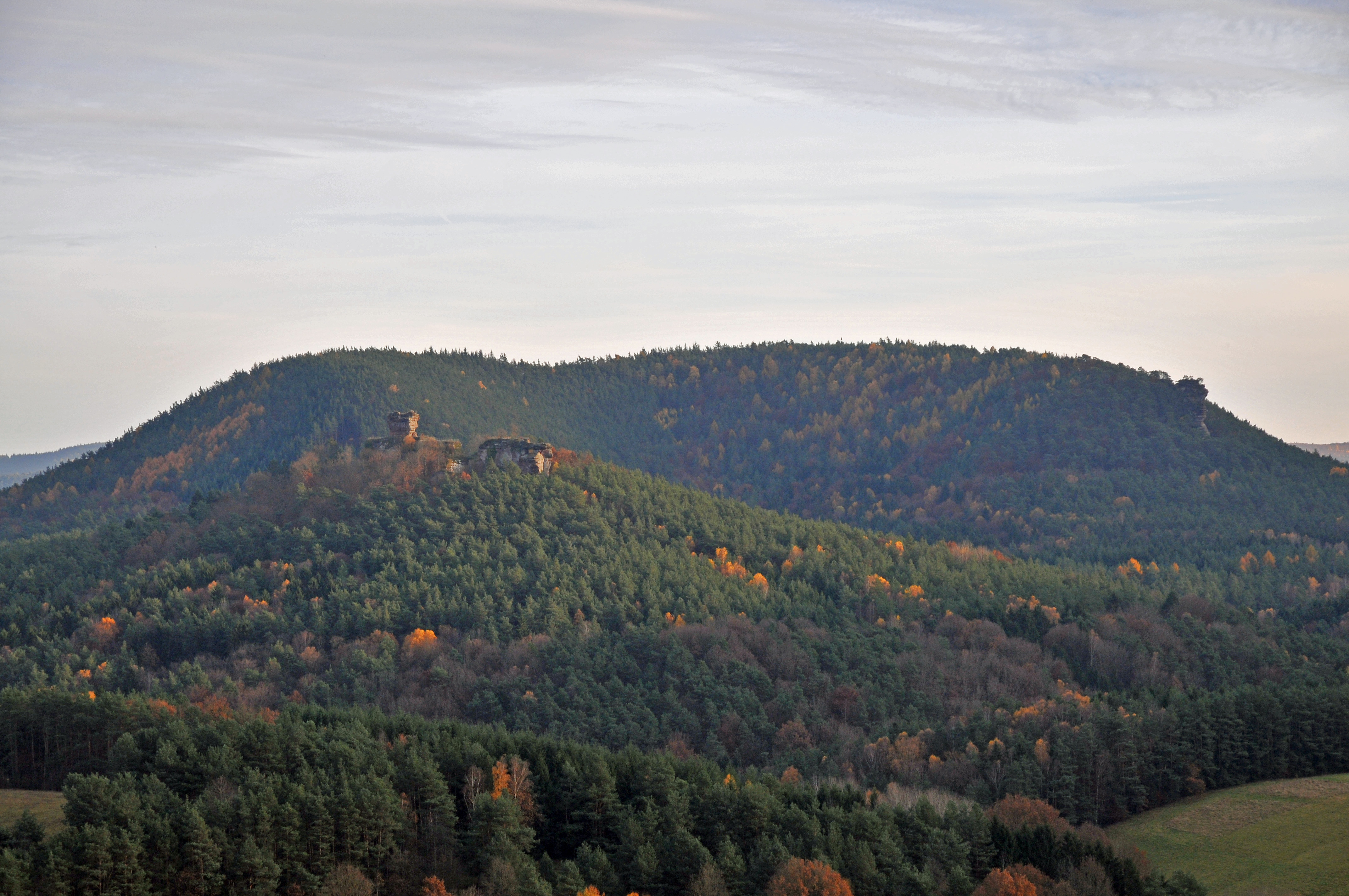 Im Vordergrund die Ruine Drachenfels, dahinter die Nordwestflanke des Heidenbergs. Am rechten Bildrand ist der Buchkammerfels zu sehen. Aufgenommen vom Sprinzel (Dickenbergpfeiler)